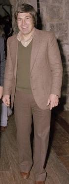 Gaztelu in 1981